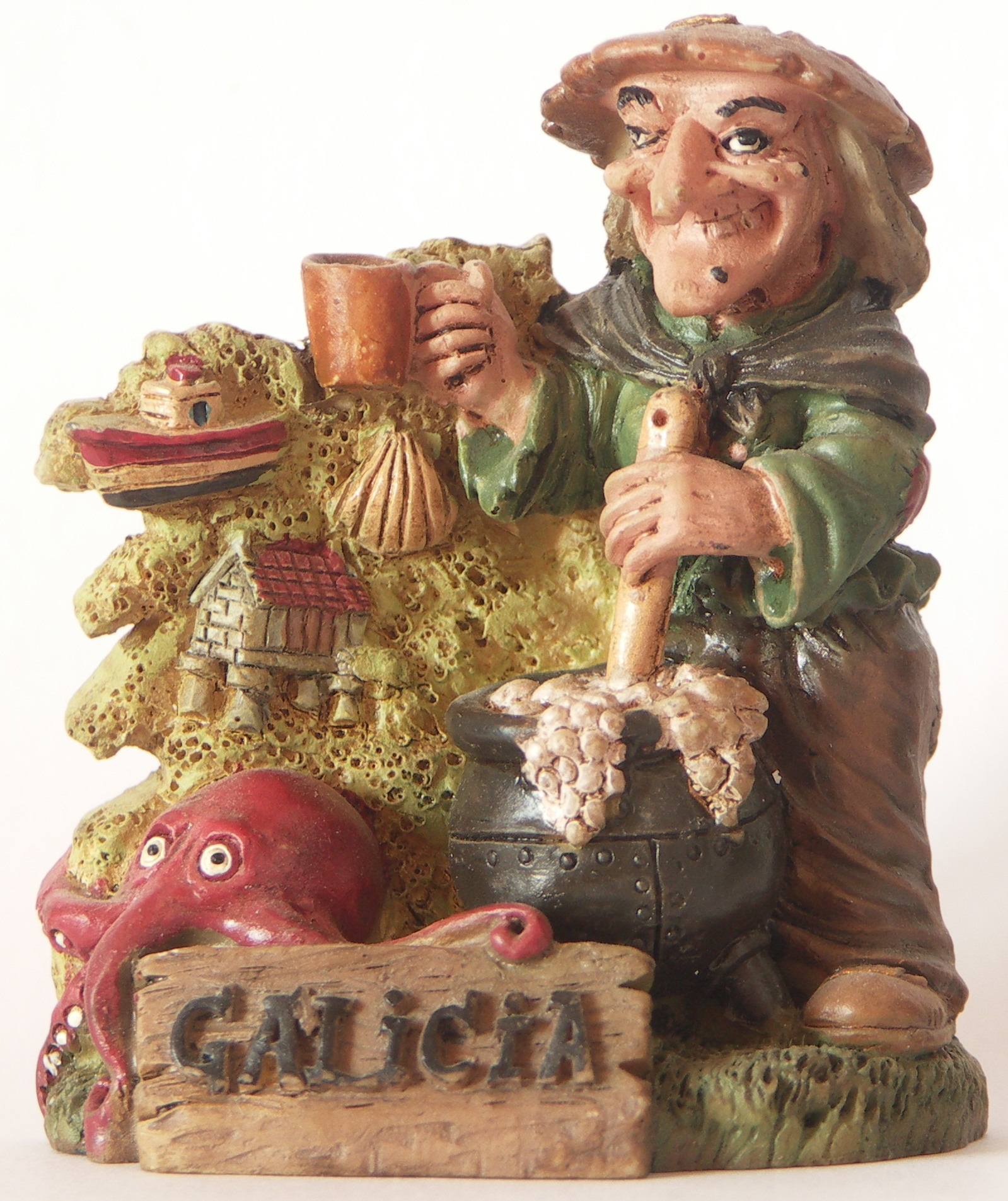 Imagen de un souvenir de Galícia con la típica meiga, el pulpo, el horreo, la concha de vieira de los peregrinos y el barco.